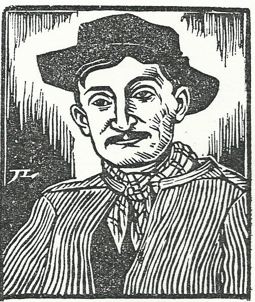 Gaston Couté, né à Beaugency le 23 septembre 1880, mort à Paris le 28 juin 1911, est un poète libertaire et chansonnier français.